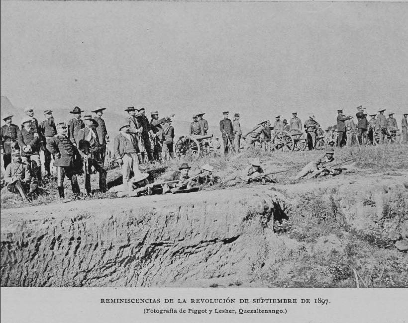 Campo de batalla de la Revolución quetzalteca en 1897.